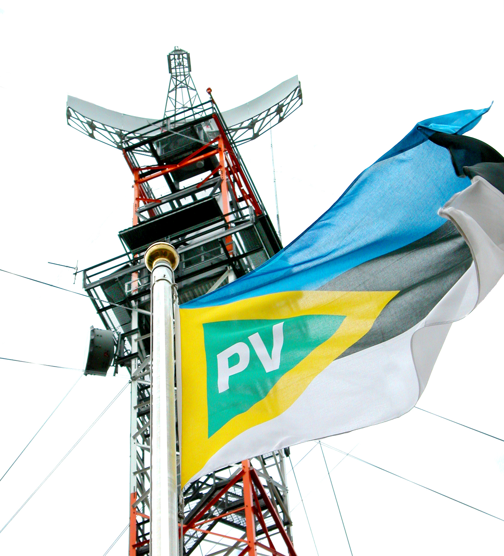 Seireradar ja Piirivalve lipp.